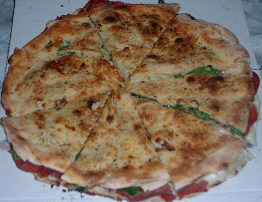 Pizzolo, a tipical kind of pizza.